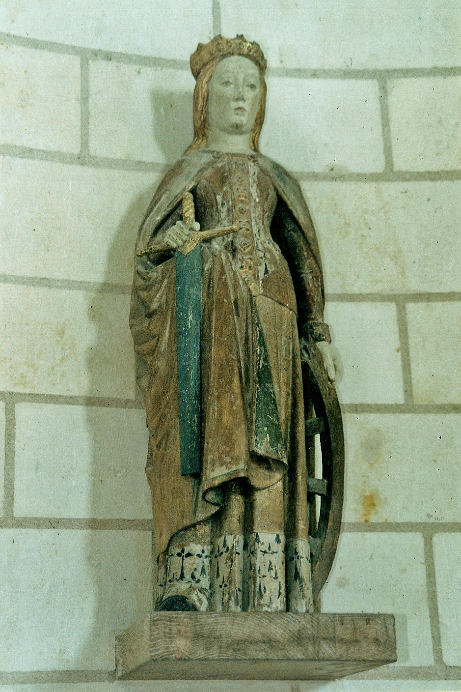 N.-D. Cunault, Hl. Katharina, Holz, farbig gefasst